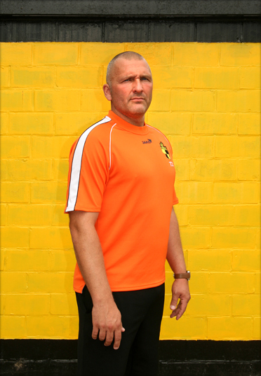 Eric Van Meir.